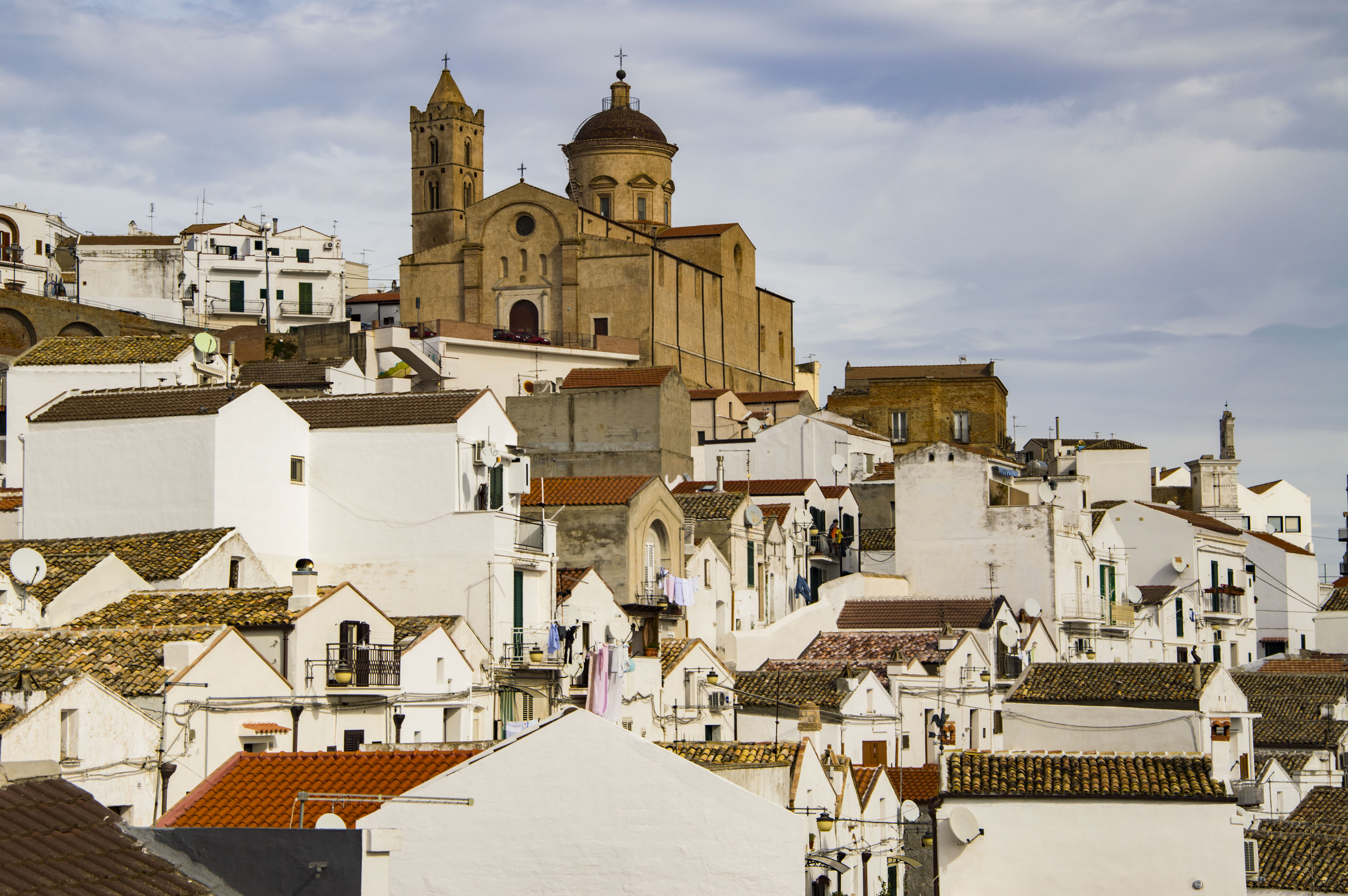 Rione Dirupo This is a photo of a monument which is part of cultural heritage of Italy.